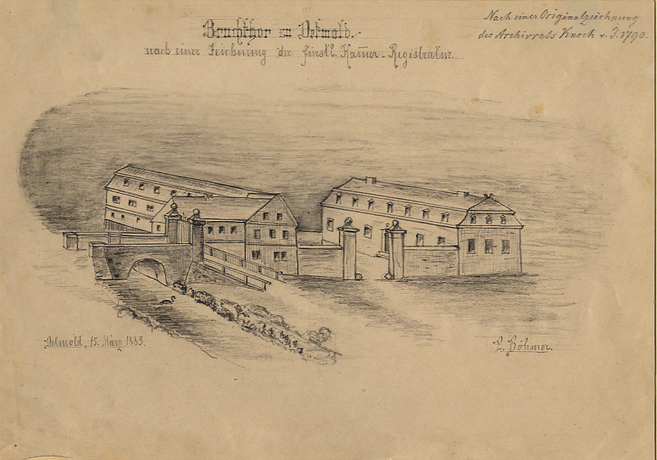 Ehemaliges Heilig-Geist-Hospital und Zuchthaus am Bruchberg in Detmold